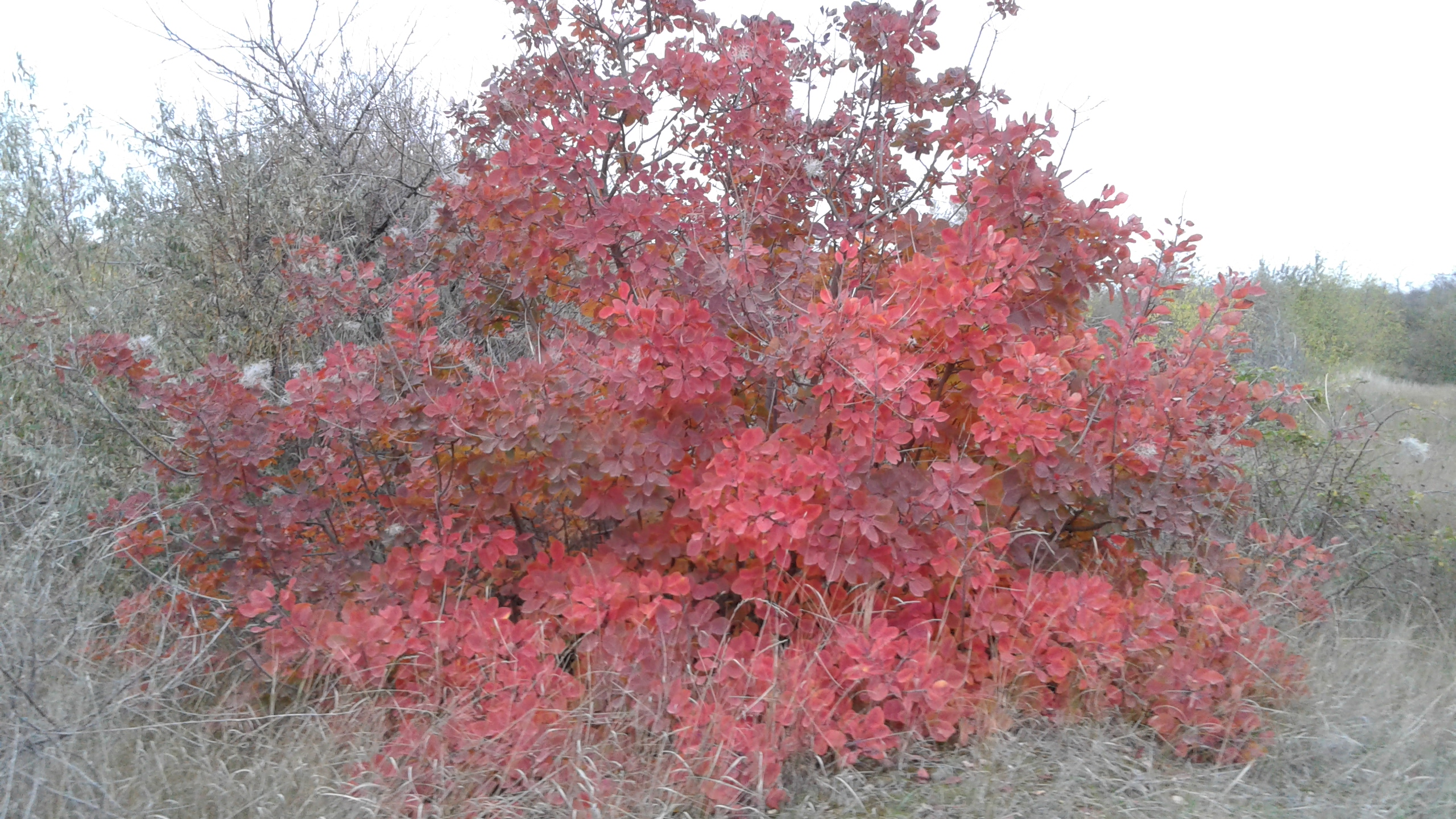 Скумпія в лісі (Миколаївщина)